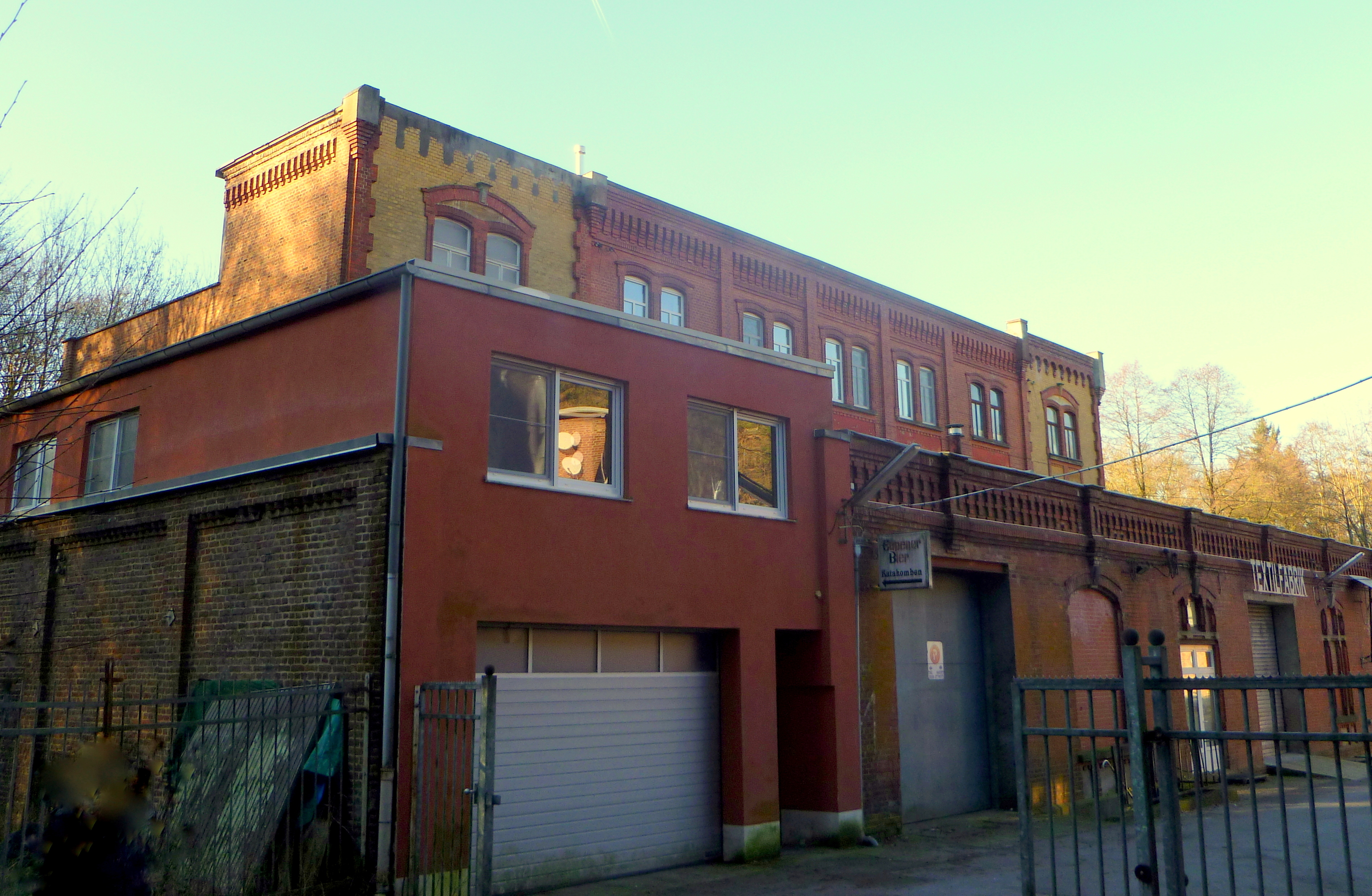 Ehemalige Tuchfabrik Wilhelm Peters & Cie in Eupen, Langesthal; Verwaltungsgebäude